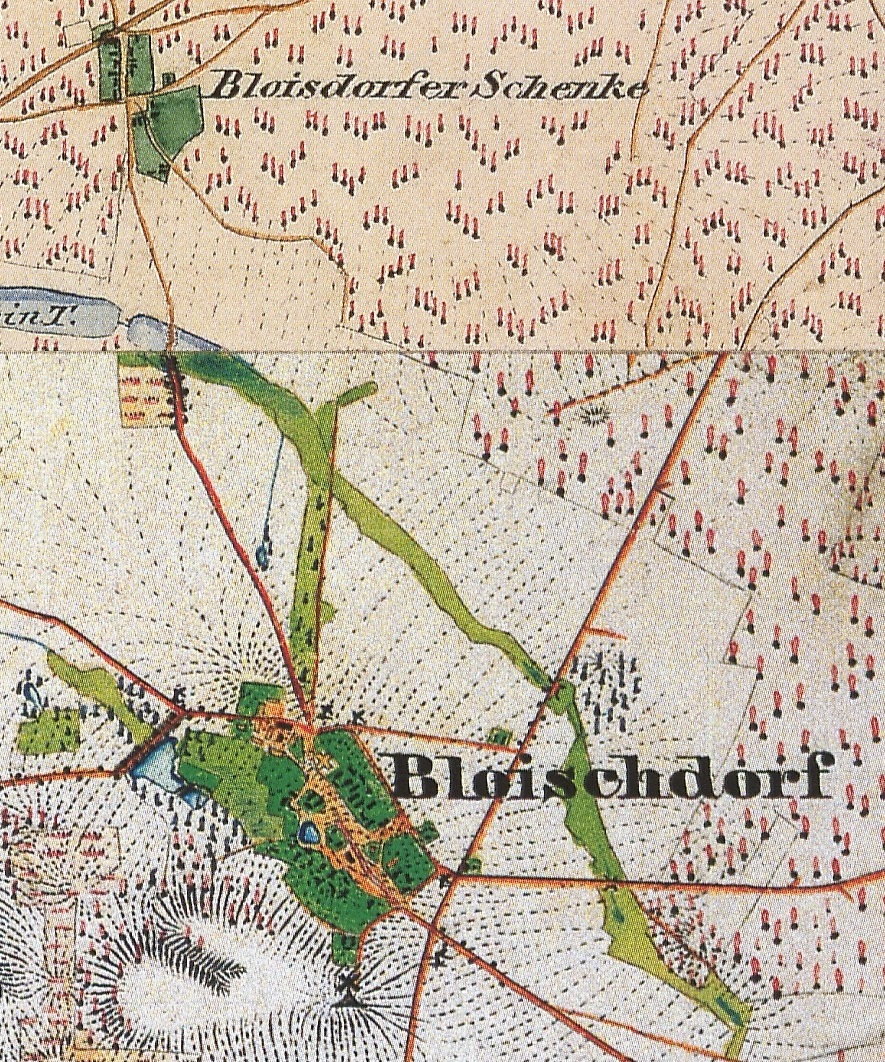 Bloischdorf, Ortsteil der Gemeinde Felixsee, Landkreis Spree-Neiße, Brandenburg, Ausschnitte aus den Urmesstischblättern 4352 Sellessen und 4452 Spremberg von 1845 und 1846 kombiniert